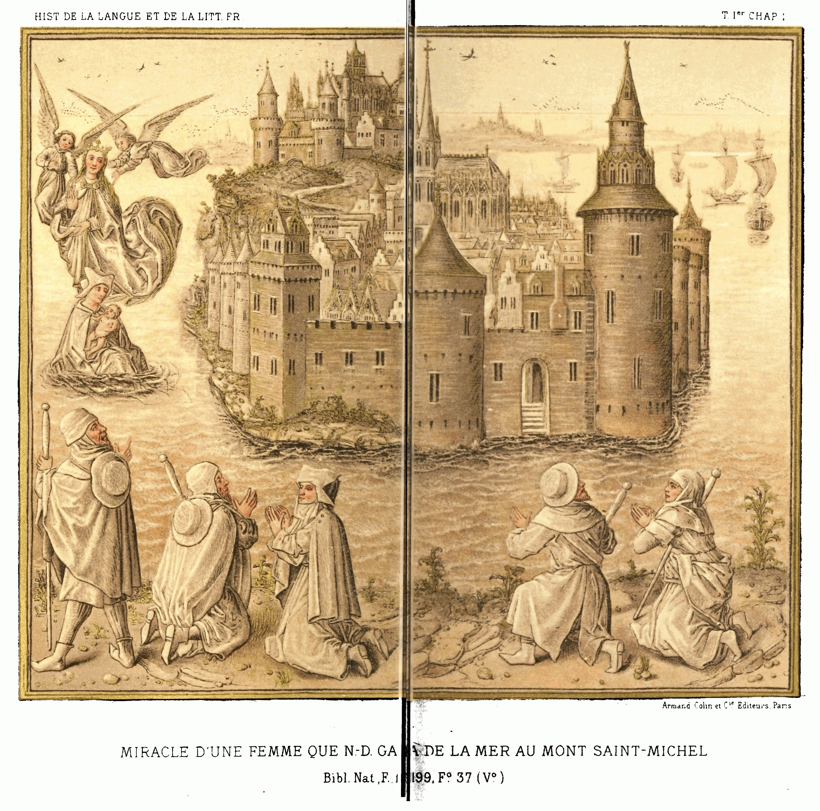 Miracle de Notre-Dame au Mont St Michel